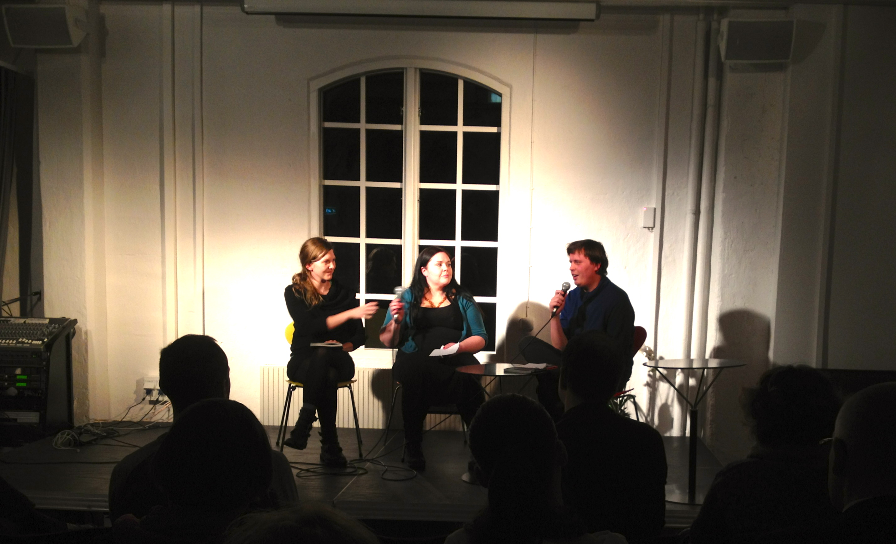 Samtal med Yvette Gustafsson, Malin Biller och Pär Thörn, i Litteraturhuset i Göteborg (Göteborgs lagerhus).